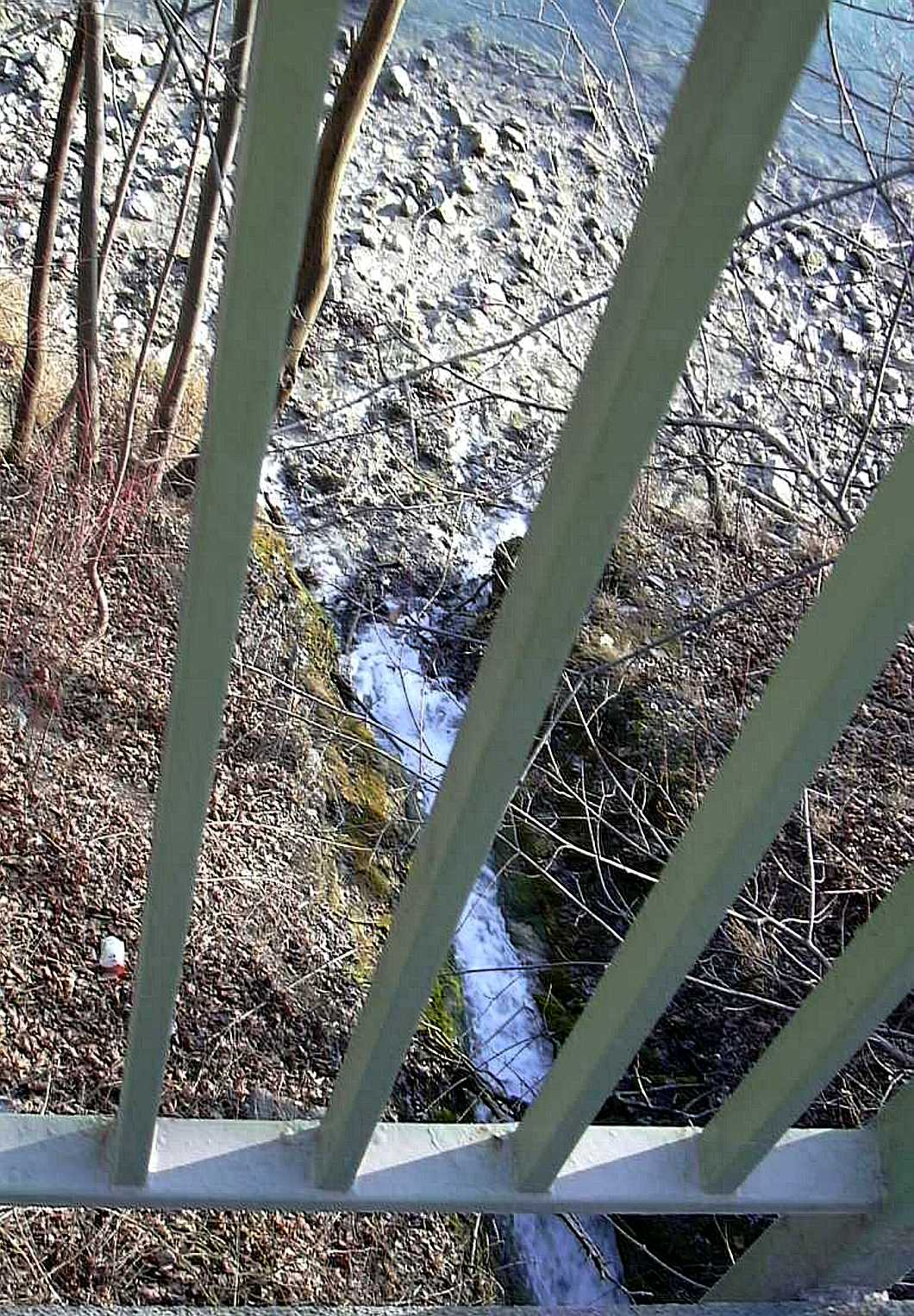 Weissbach Mouth